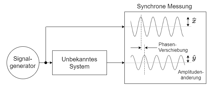 Messung von Phasenverschiebung und Amplitudenänderung